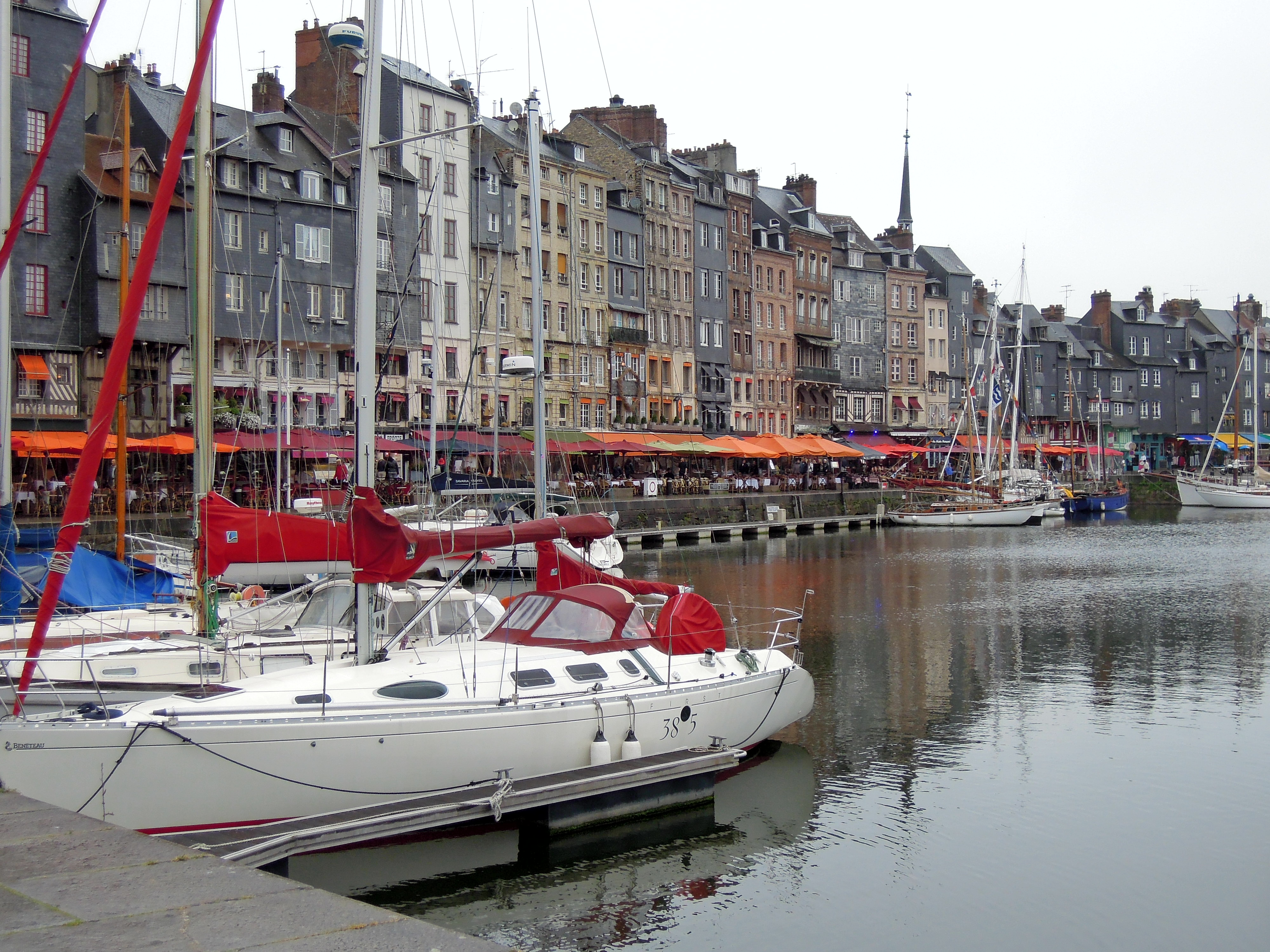 Honfleur eine kleine, charmante Stadt in der Normandie.